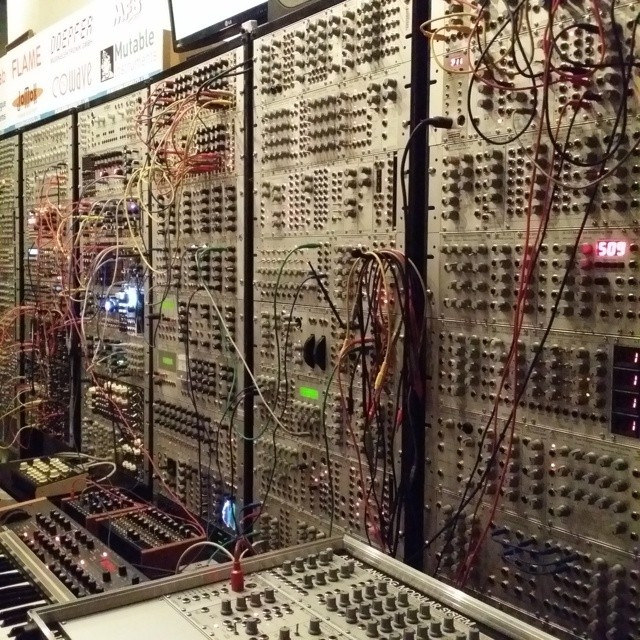 “Tokyo Festival of Modular 2014、2日目終了。今夜も堪能した。ライブのいくつかを最前列で見た。勉強になった。よいイベントありがとうございます。おつかれさまです。”